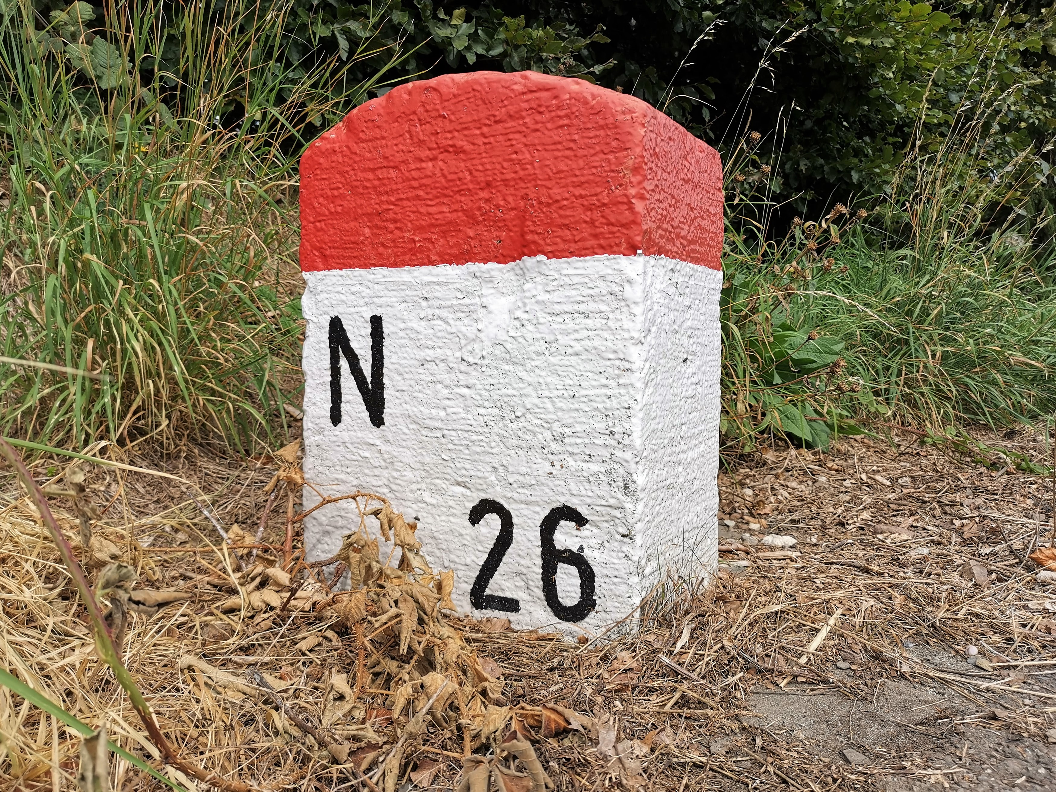 Borne kilométrique N26 au lieu-dit Schumannseck.